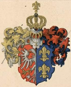 Mecki suguvõsa aadlivapp